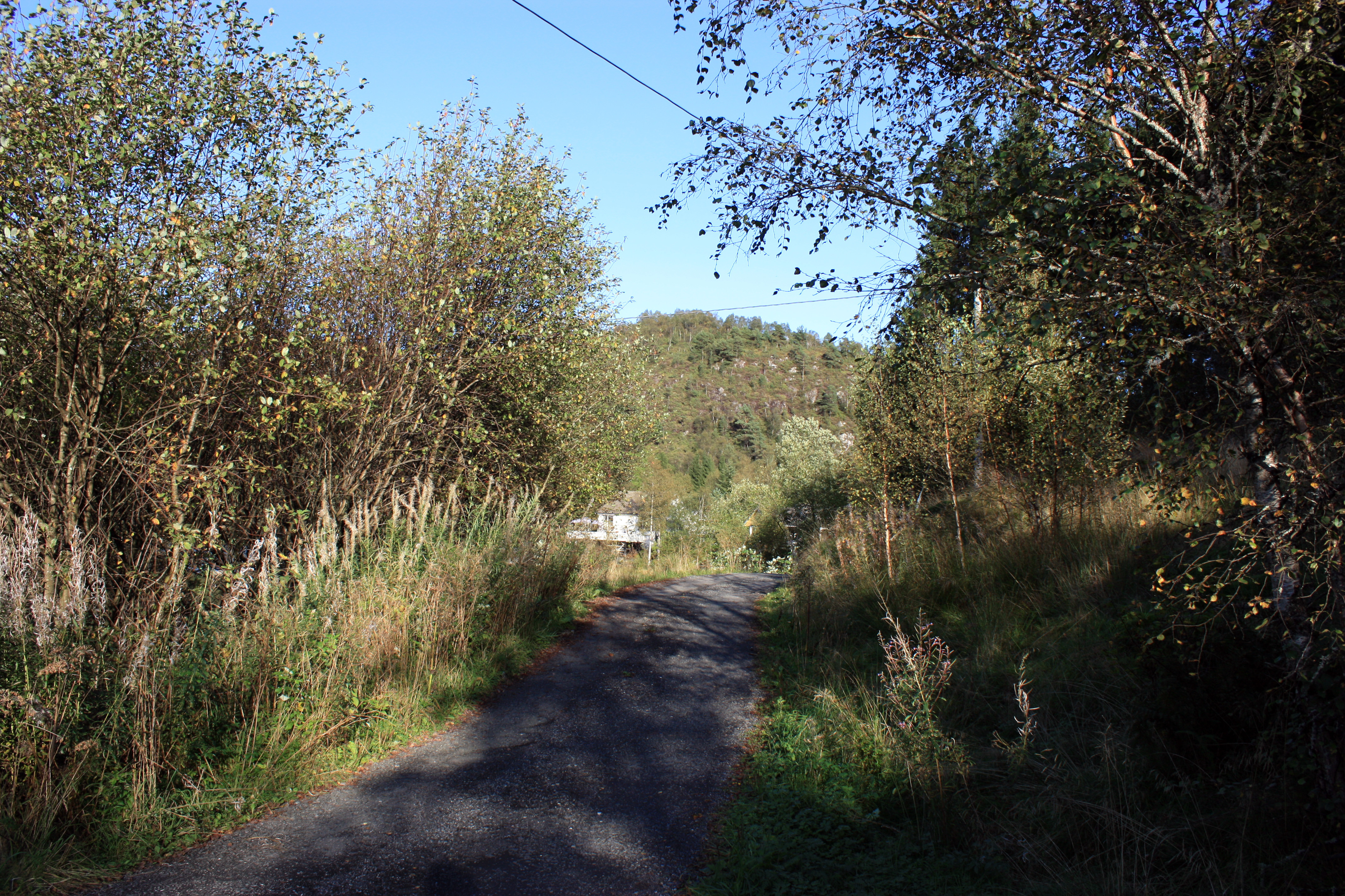 Dyngelandseidet, Fana, Bergen.